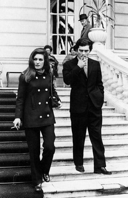 Les deux célébrités sortant du festival de San Remo 1967